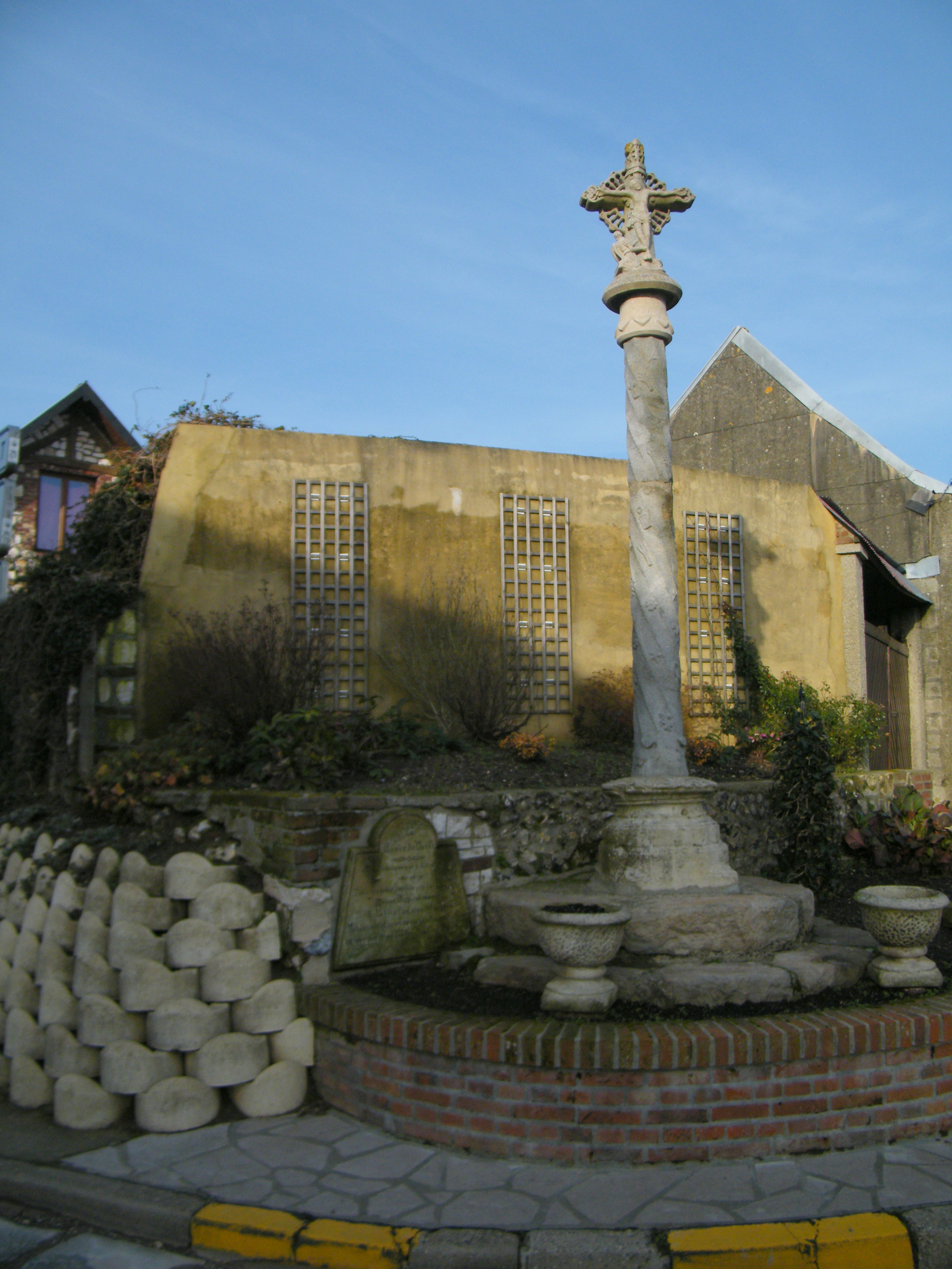 La croix du bailly.